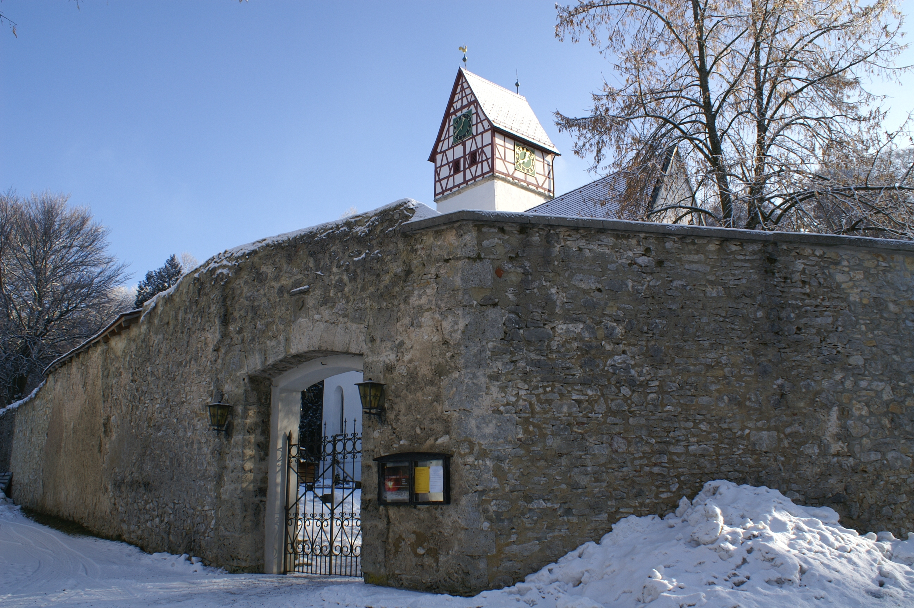 Die Martinskirche in Zainingen ist von einer mächtigen Schutzmauer umgeben